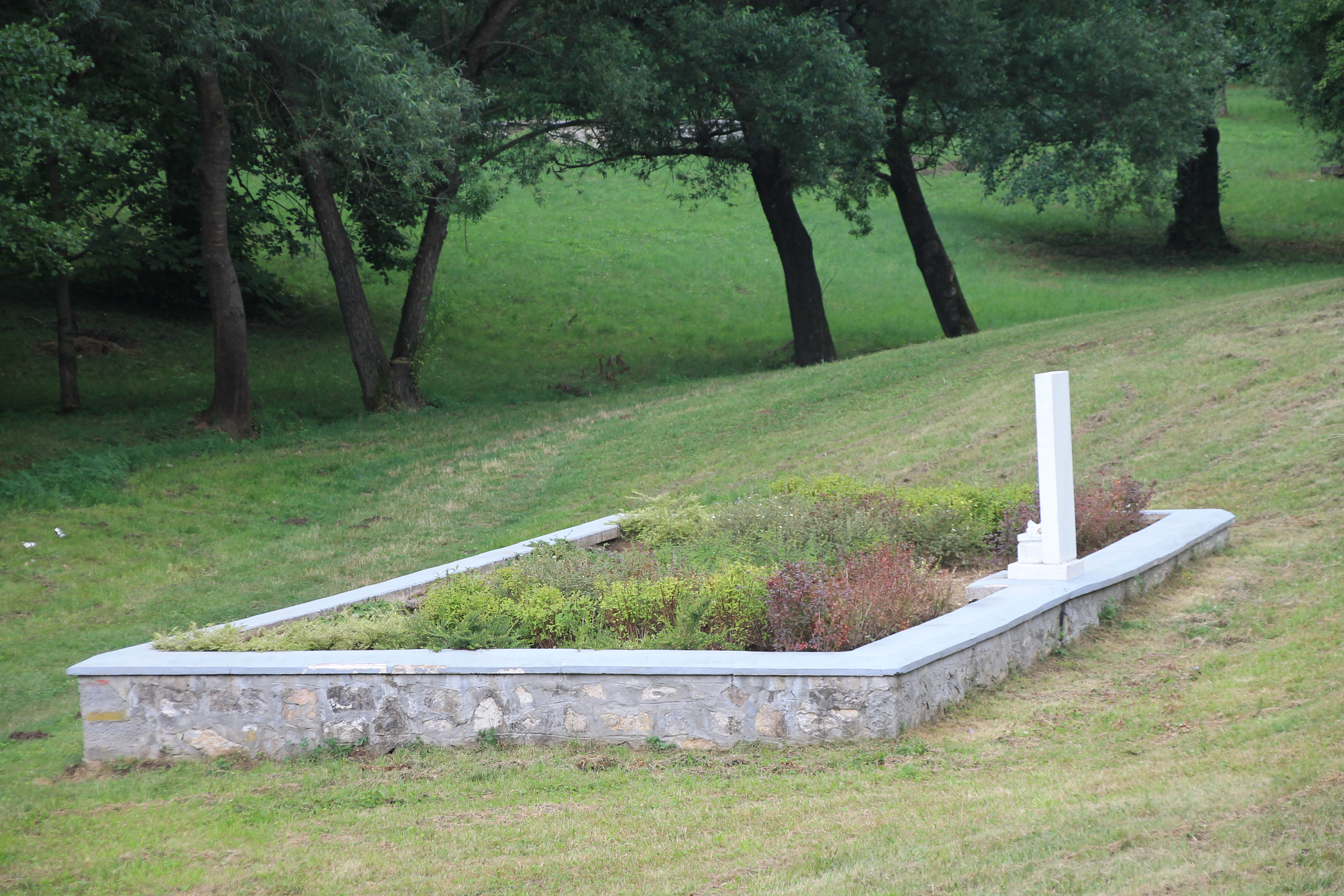 Šumarice Memorial Park